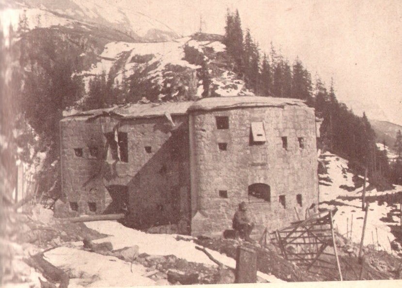 Fort Ruaz (Sperre Ruaz)